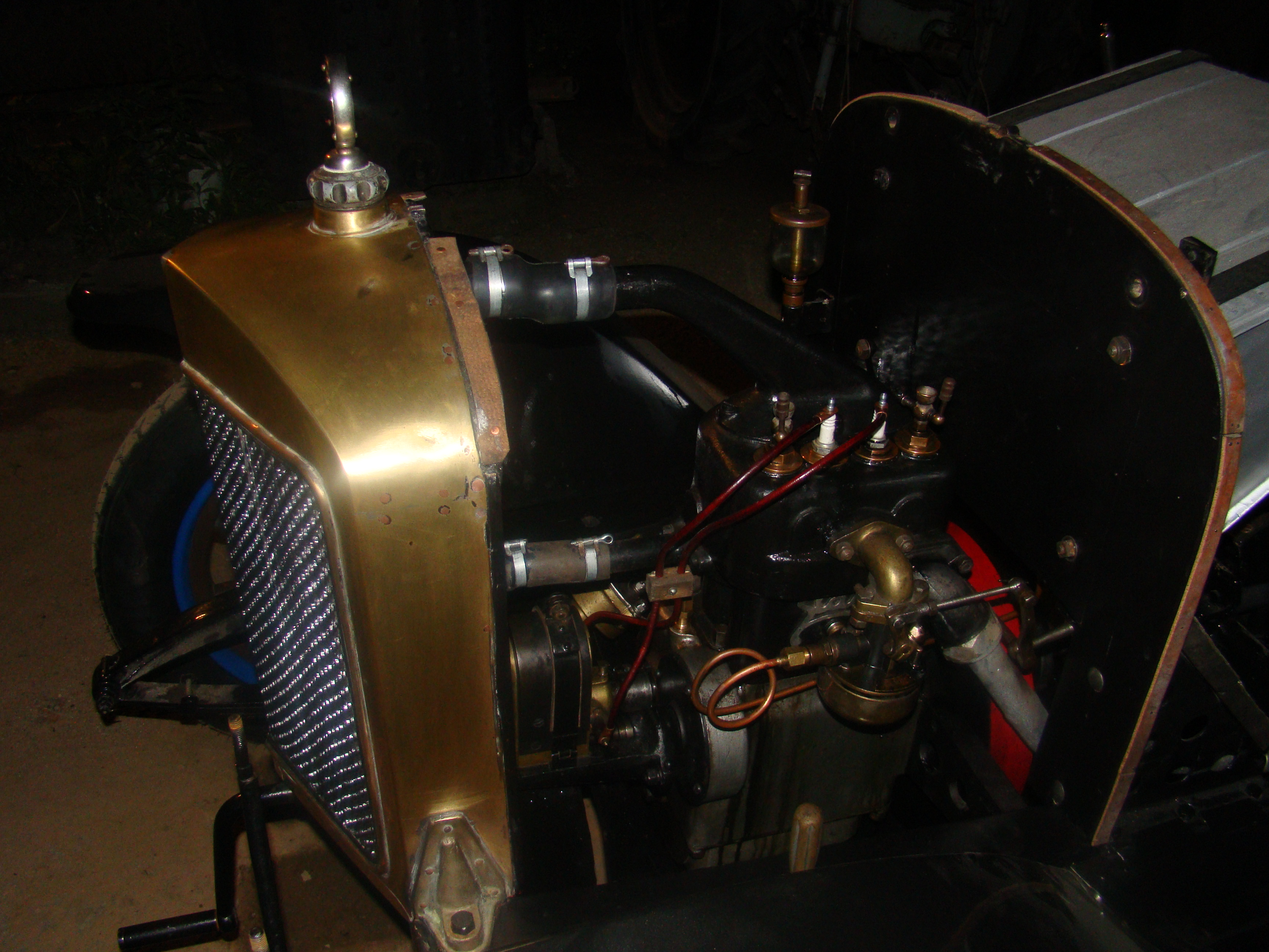 radovi dvojvalec START B